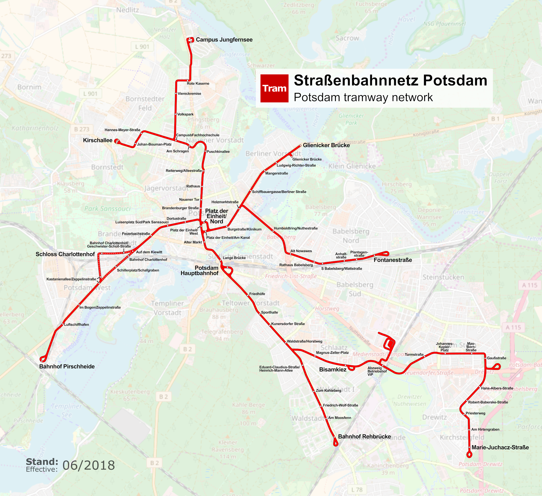 Linienverläufe der Straßenbahn Potsdam